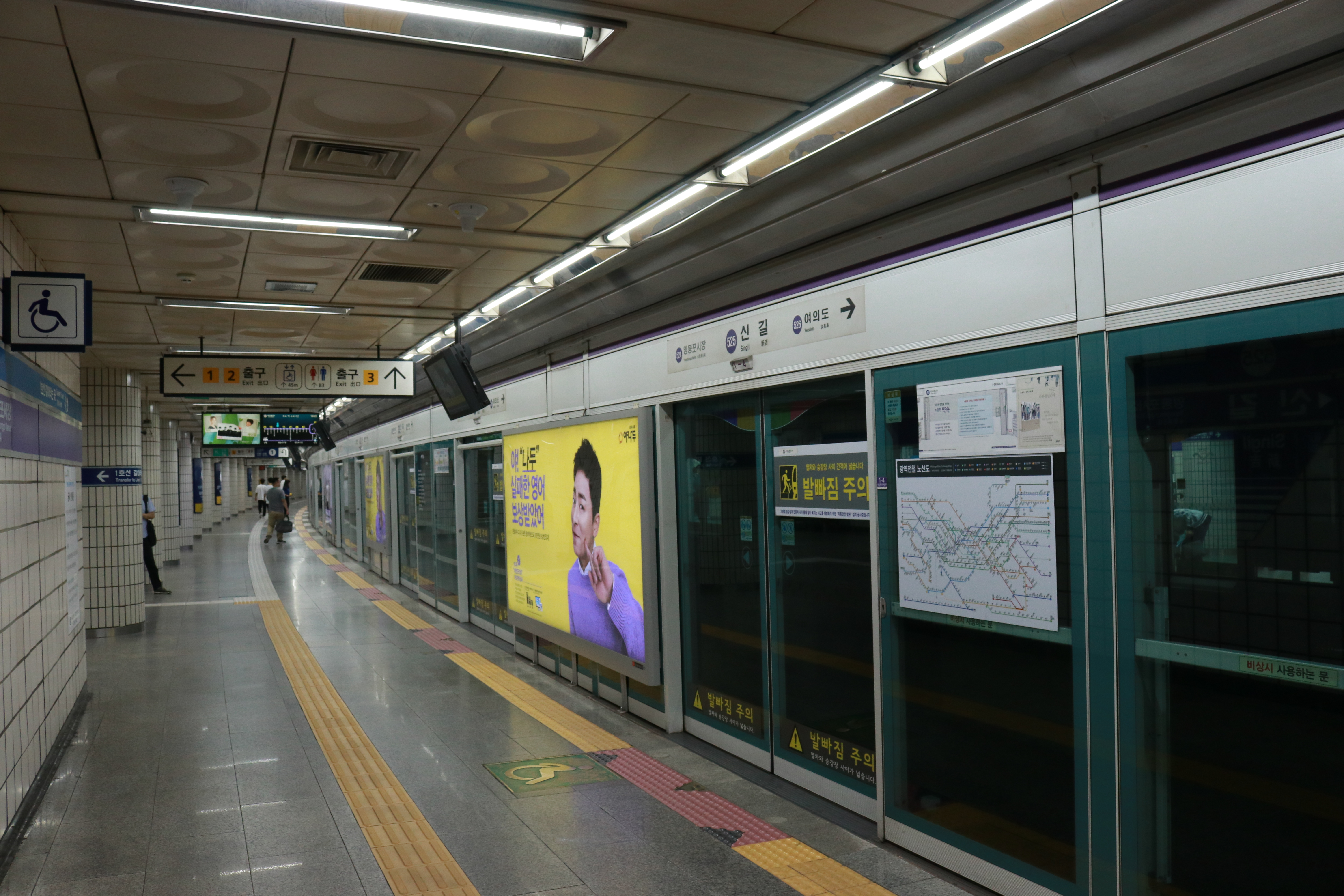 신길역 5호선 승강장